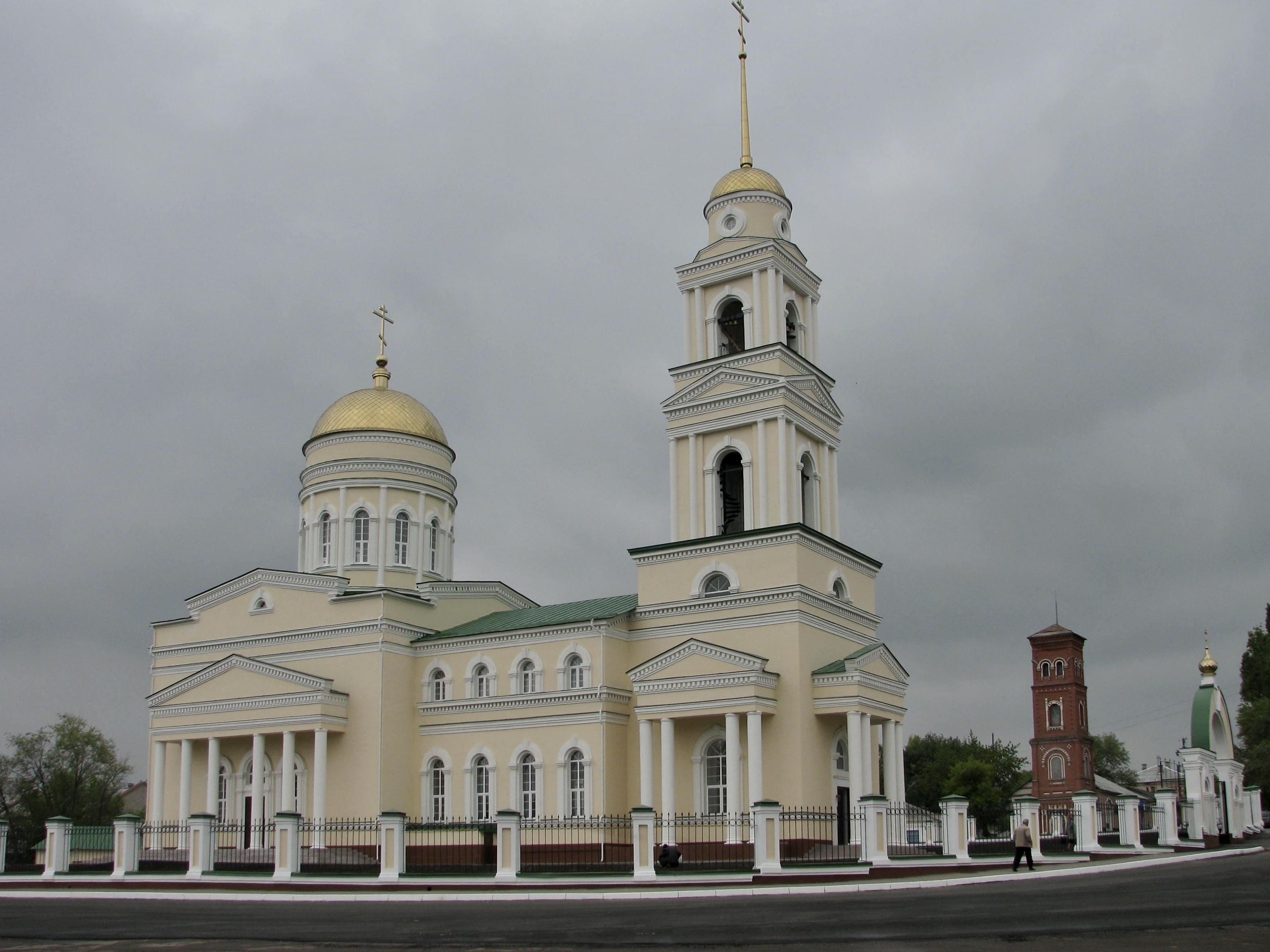 Троицкий собор в городе Вольске, Саратовская область